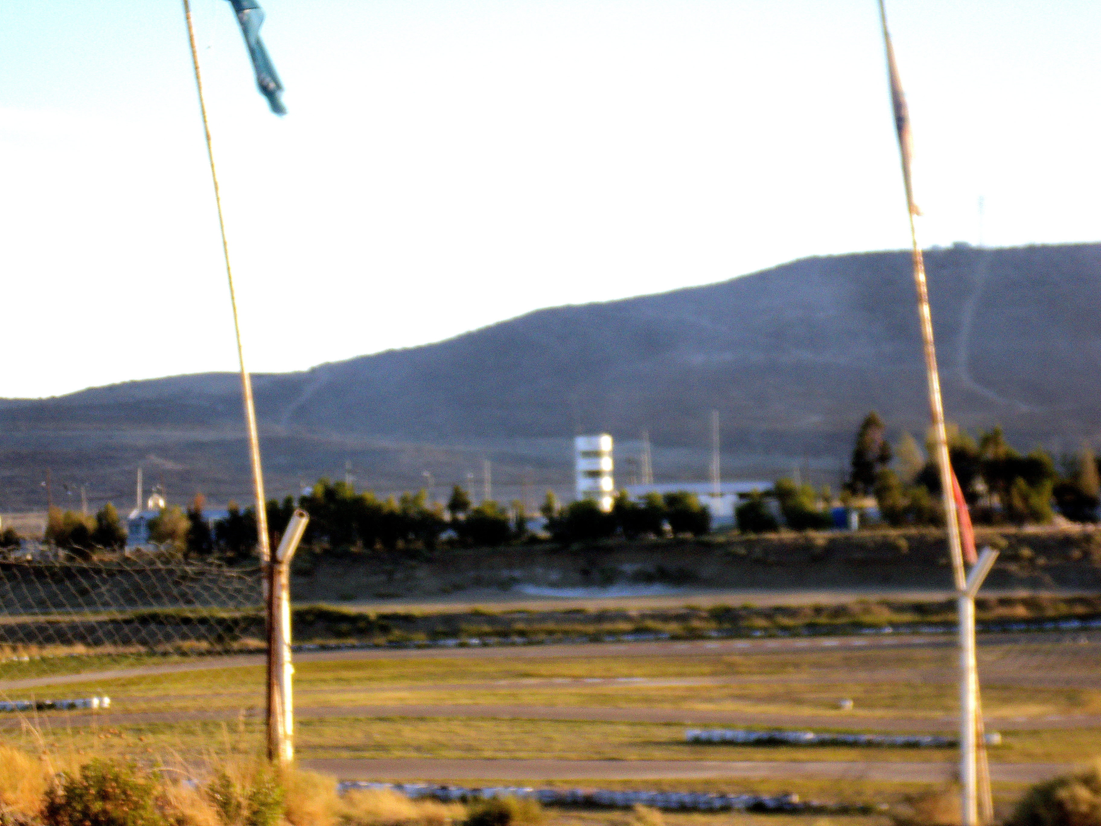 La torre de panorama de 3 pisos desde la ruta